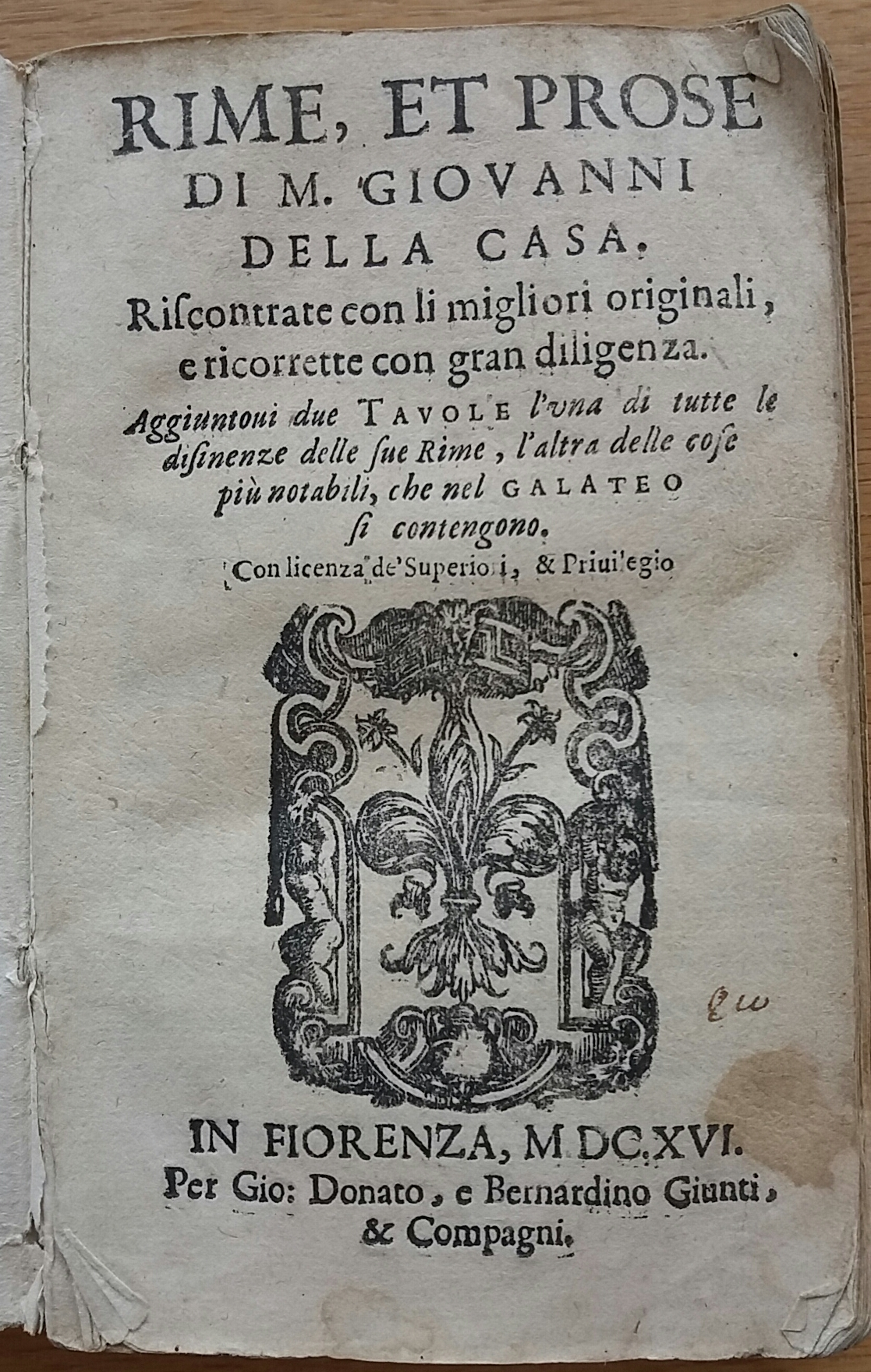 frontespizio del volume Della Casa, Giovanni, Rime, et prose / di m. Giouanni Della Casa ; riscontrate con li migliori originali, e ricorrette con gran diligenza ; aggiuntoui due tavole l'una di tutte le desinenze delle sue Rime, l'altra delle cose più notabili, che nel Galateo si contengono. Firenze, Giunti, 1616